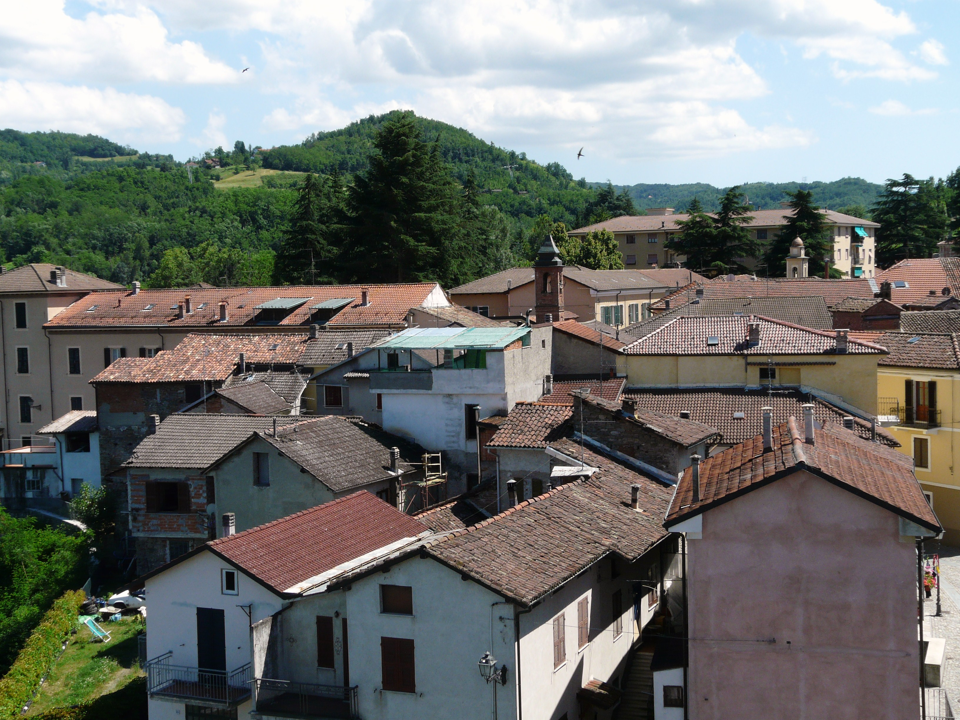 Panorama di Visone, Piemonte, Italia